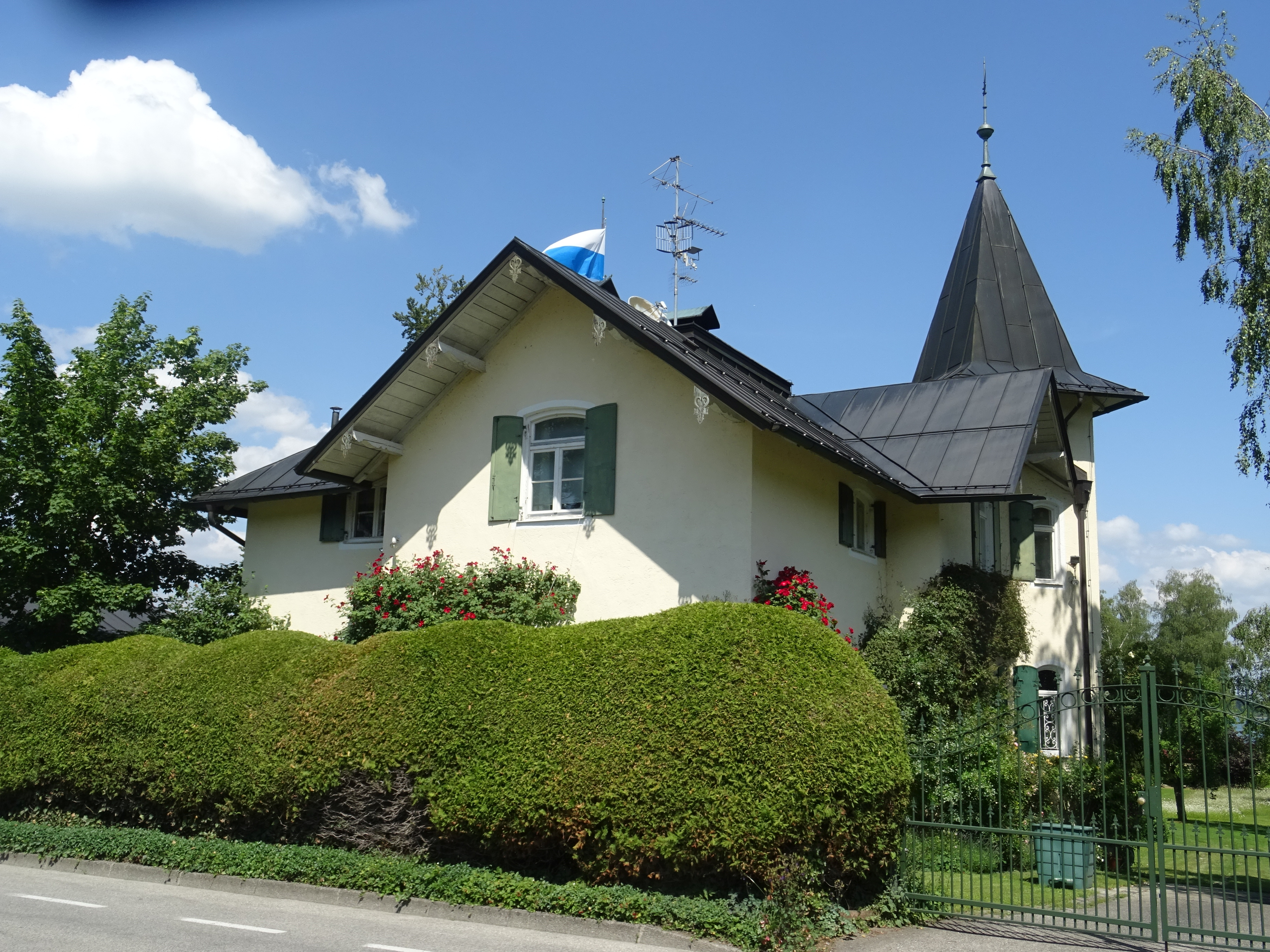 Prien Stock, denkmalgeschütztes Wohnhaus Harraser Str. 7